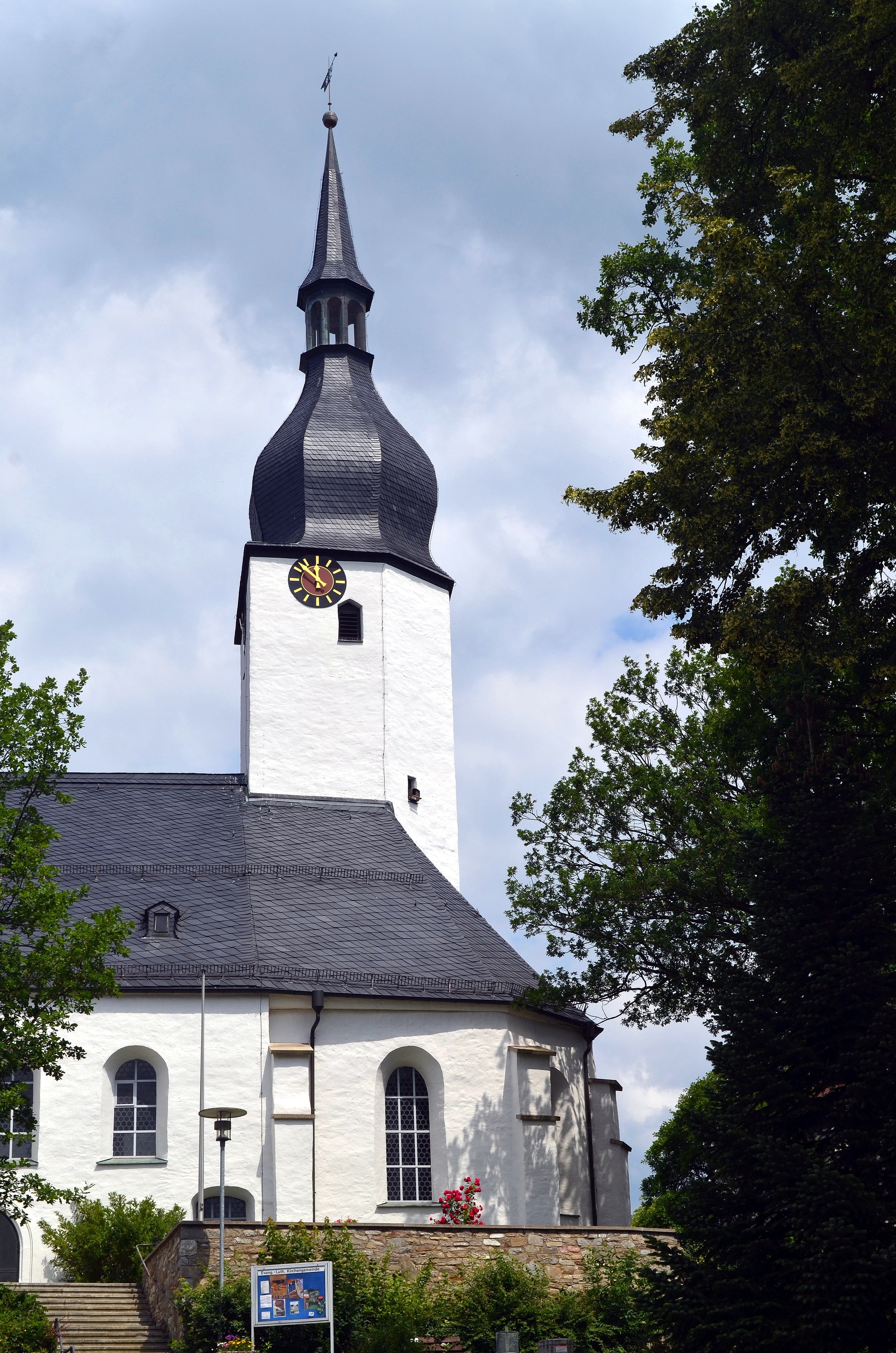 Thiersheim (Oberfranken-Deutschland) - Evangelisch-lutherische Sankt Ägidien Pfarrkirche.